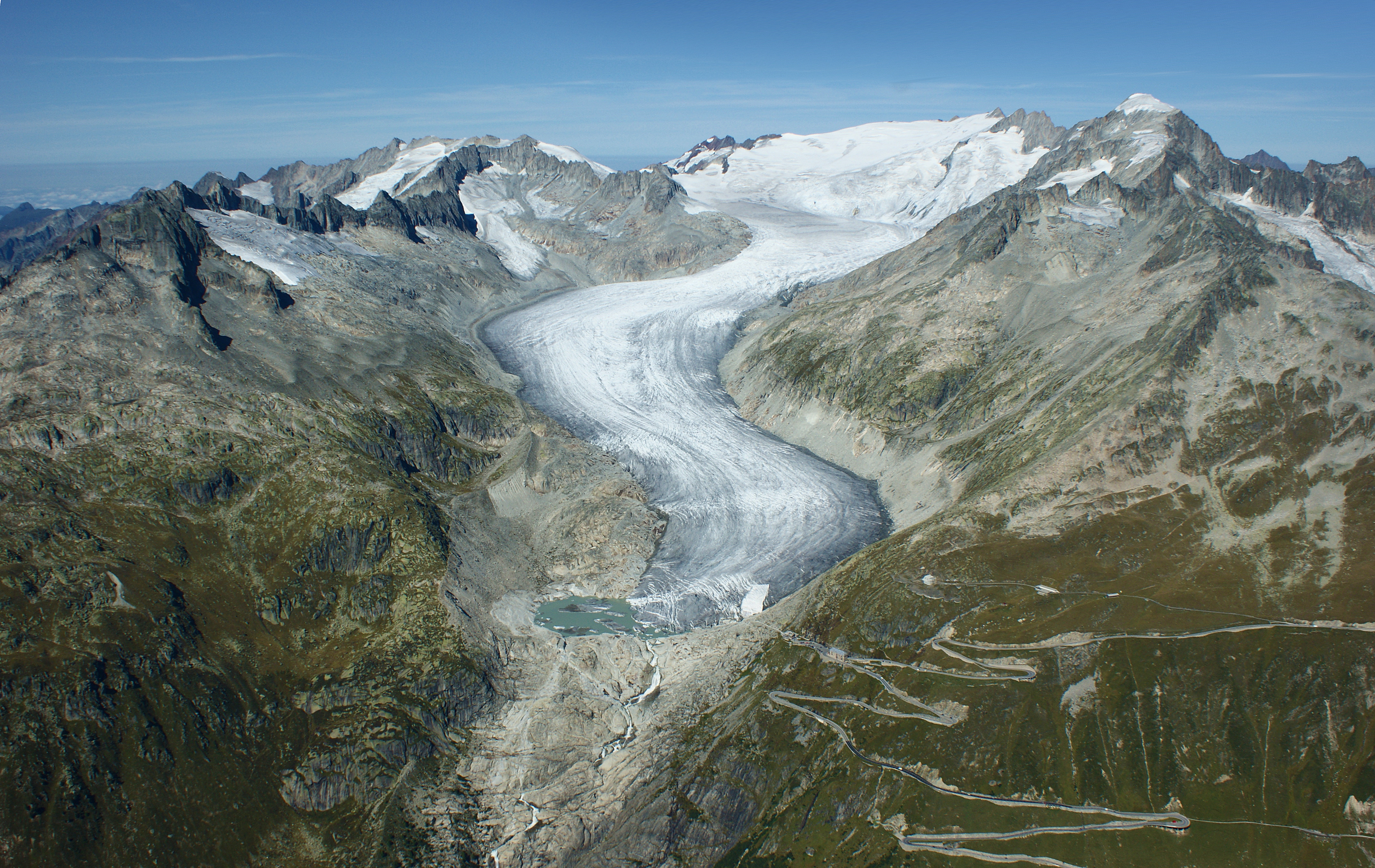 Rhonegletscher und Furkapass vom Flieger aus fotografiert